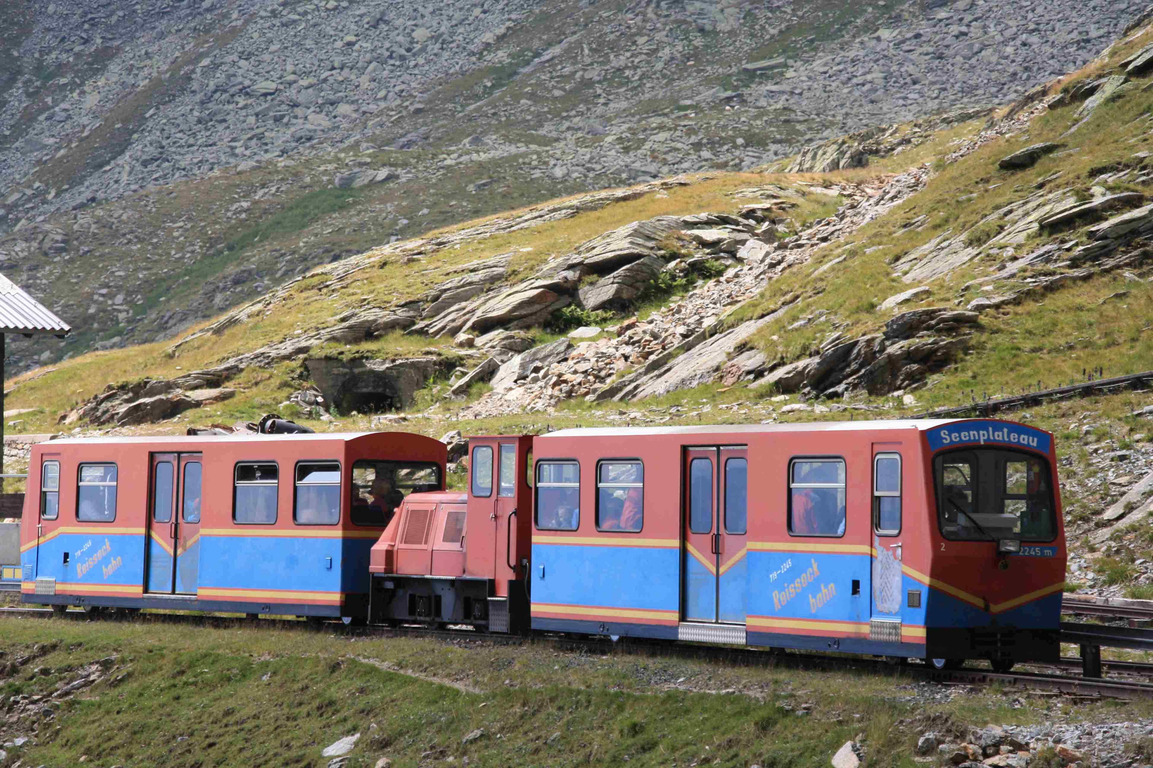 Die Schmalspurbahn am Reißeck im Mölltal, Kärnten